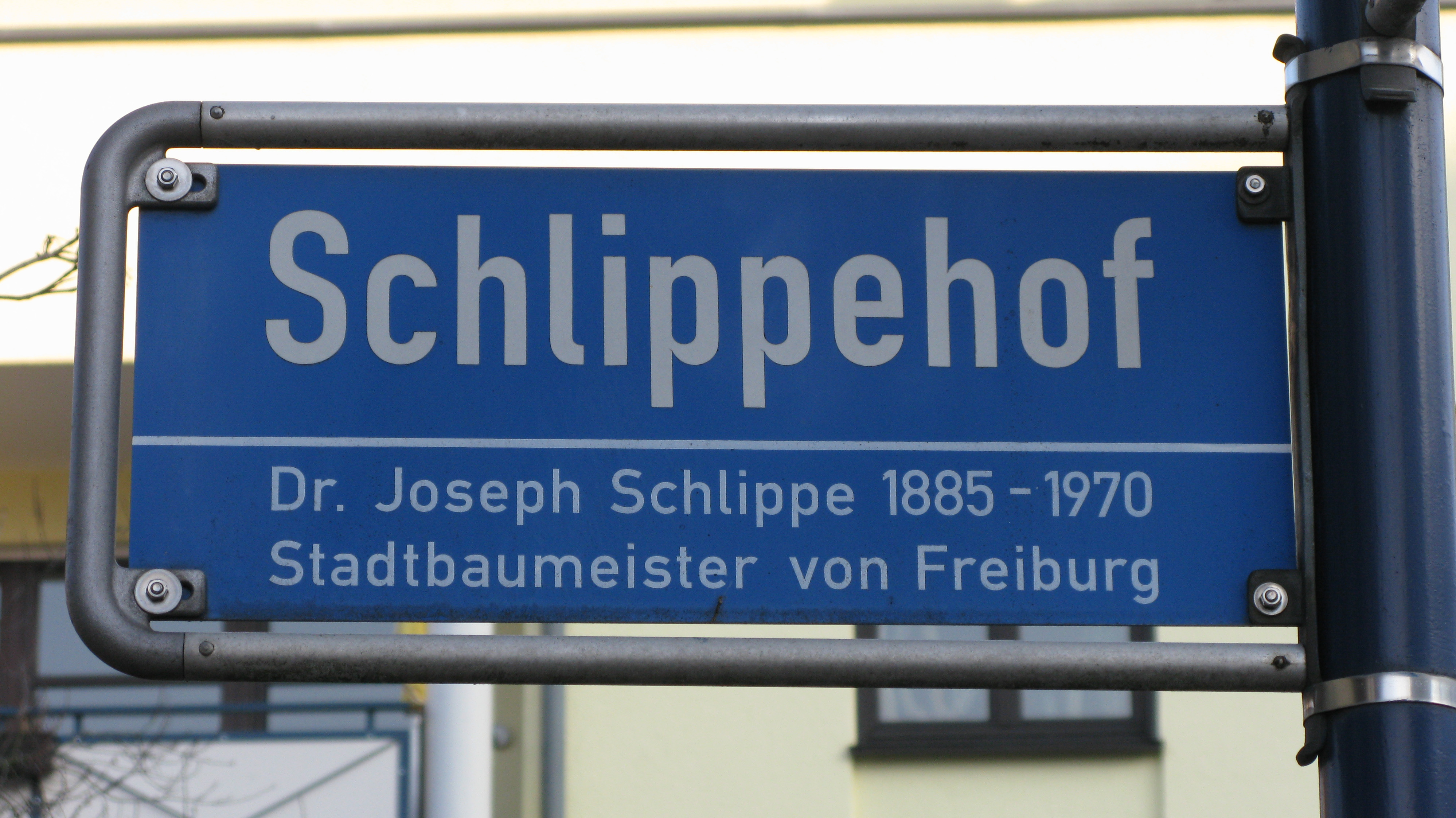 Nach Dr. Joseph Schlippe benannte Straße im Freiburger Stadtteil Betzenhausen